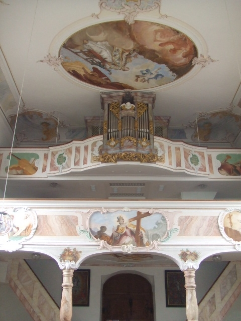 Pfarrkirche St. Cosmas und Damian, Unterwachingen, Alb-Donau-Kreis